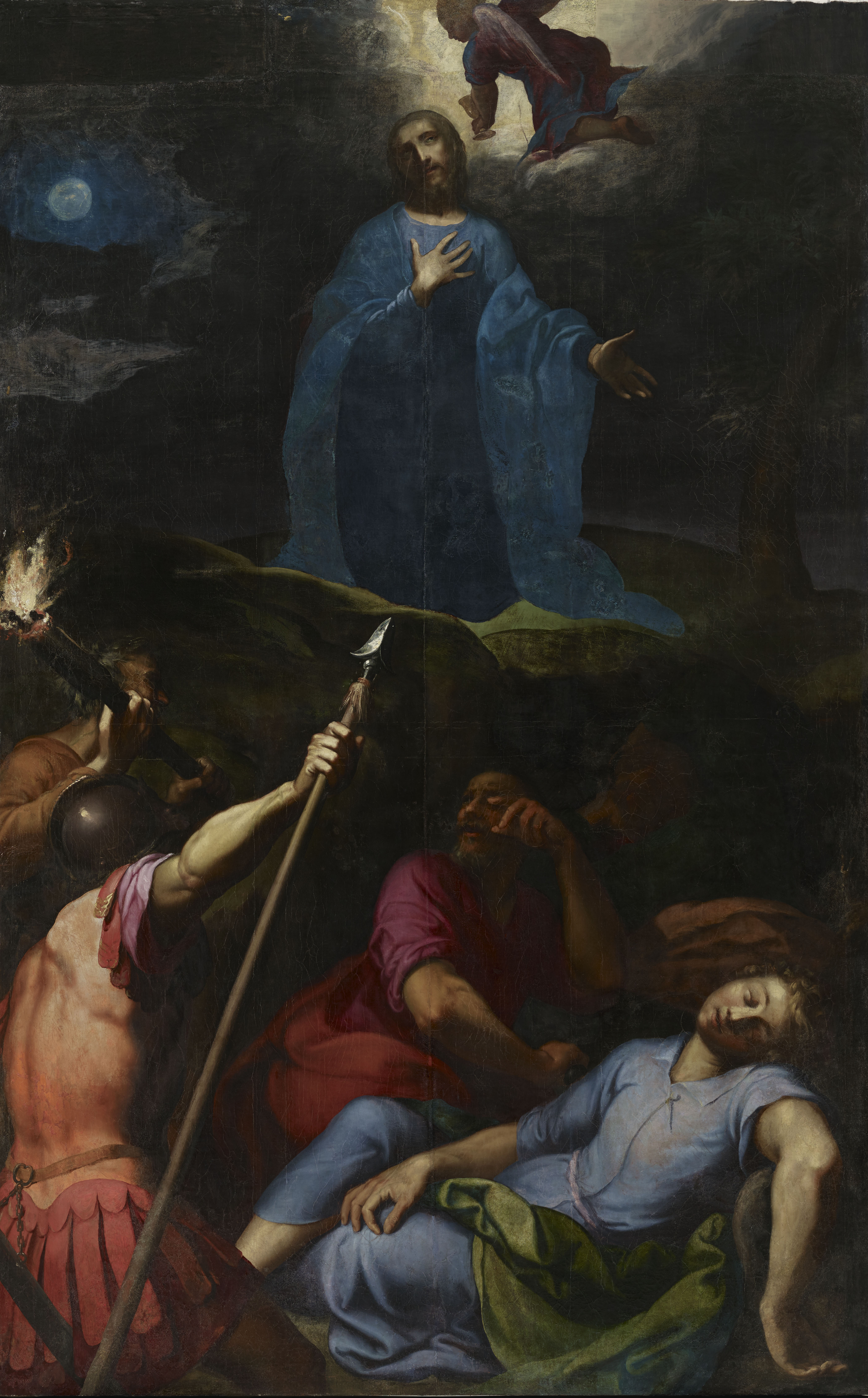 Le Christ au jardin des Oliviers, huile sur toile - 228,5 x 147 cm